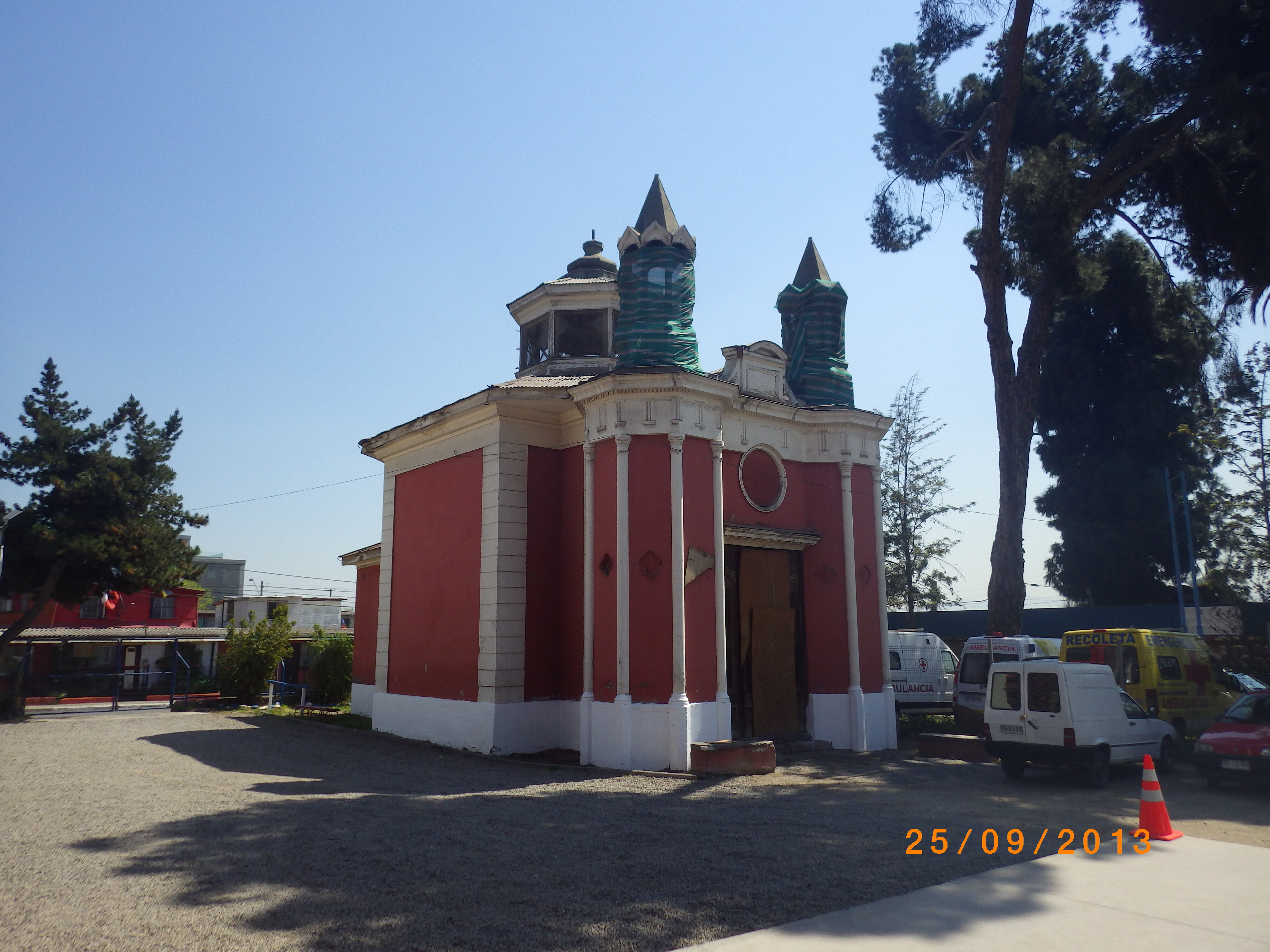 La iglesia quinta bella, de la comuna de Recoleta fue declarada monumento nacional en el año 1994, sin embargo producto de las palomas y antiguos saqueos, esta iglesia, hecha originalmente de adobe esta actualmente en restauración, la cual estaba planificada para concluir en el 2012. Entre sus curiosidades destaca que el arquitecto responsable de su trazado original, Manuel Aldunate, el también encargado de hitos como el cerro Santa Lucía, el ex-congreso nacional y el mercado central, se inspiro en los templos europeos, razon por la cual este templo tiene forma octogonal. This is a photo of a national monument in Chile: 888